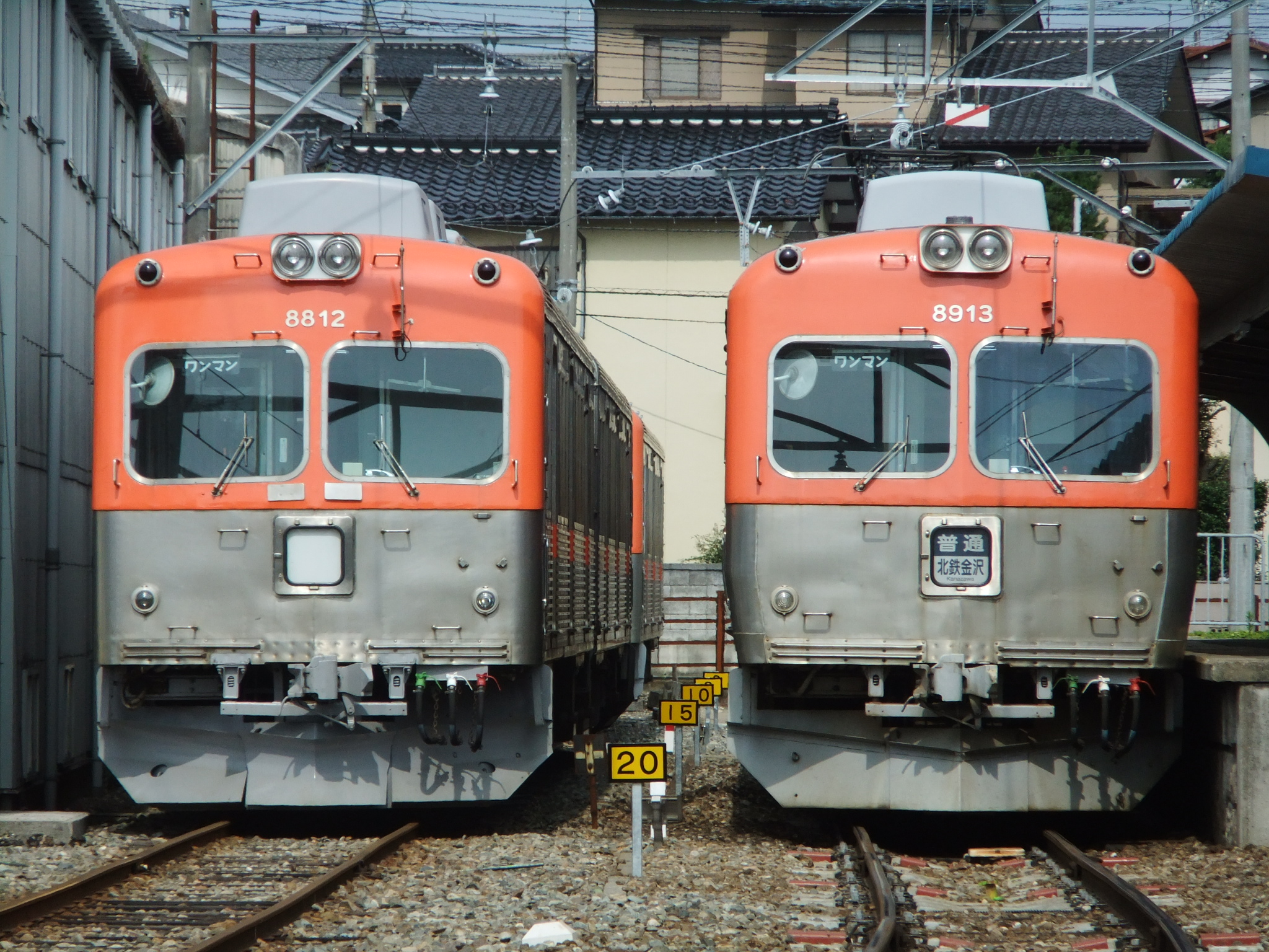 北陸鉄道8000系 種車による車体断面の違いが判る